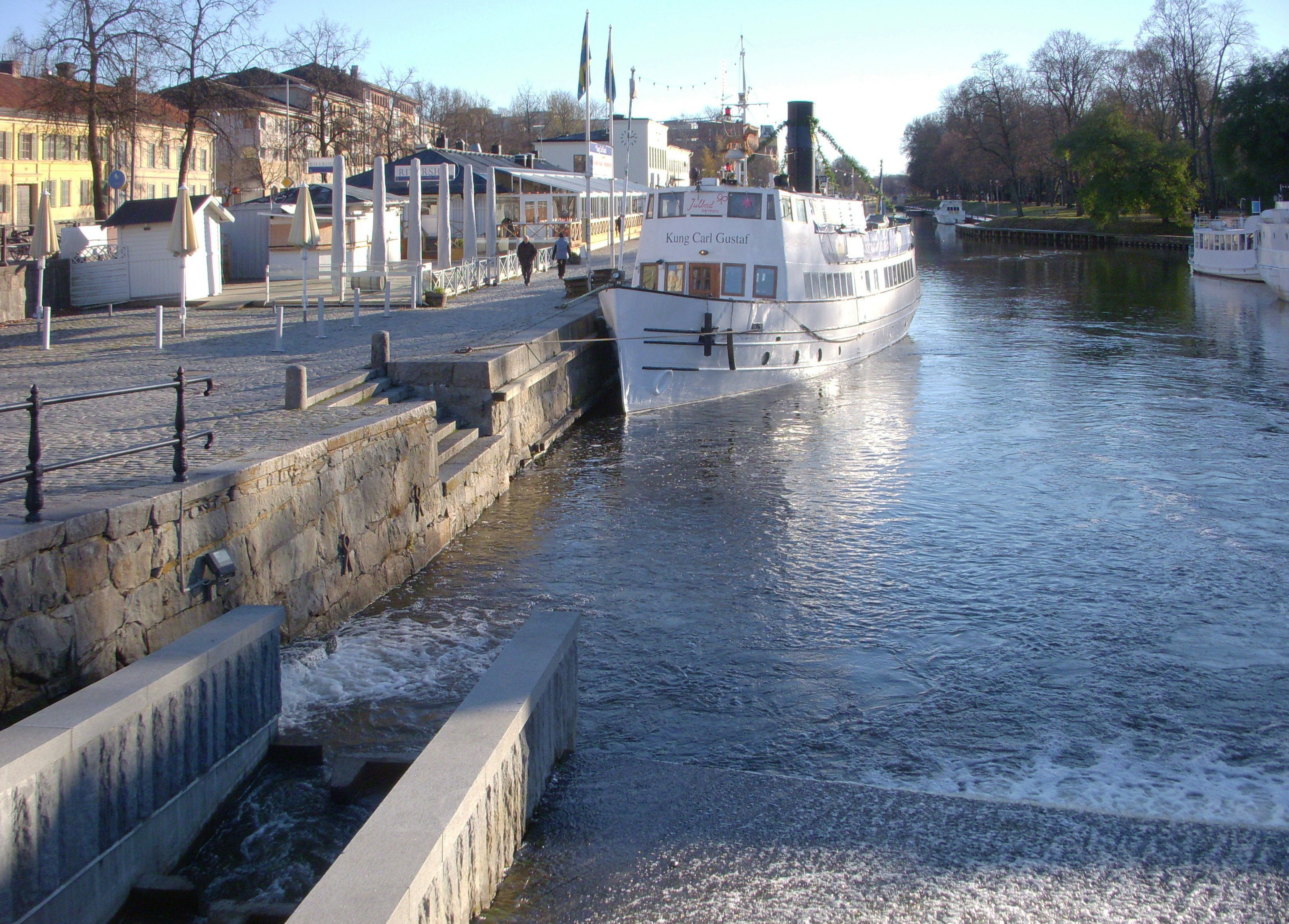 Uppsala med Fyrisån, vy söderut från Islandsbron